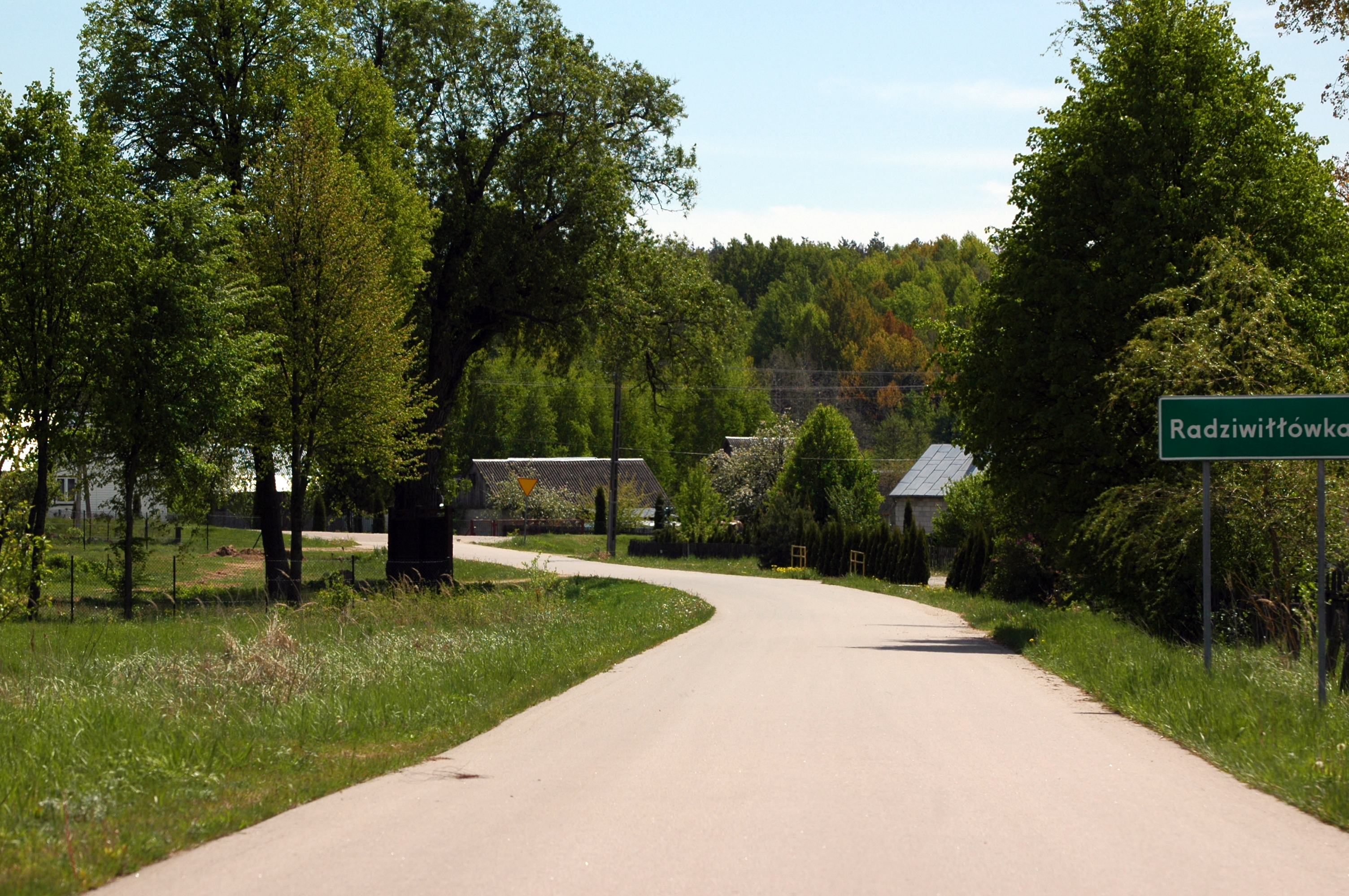 Droga w Radziwiłłówce